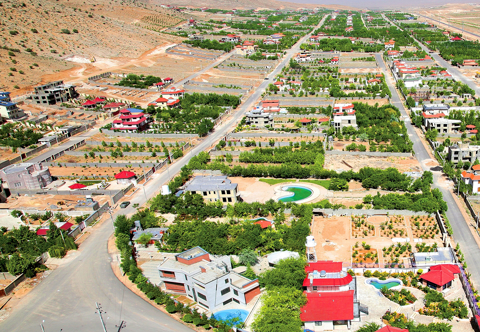 cut from File:Sadraa.jpg